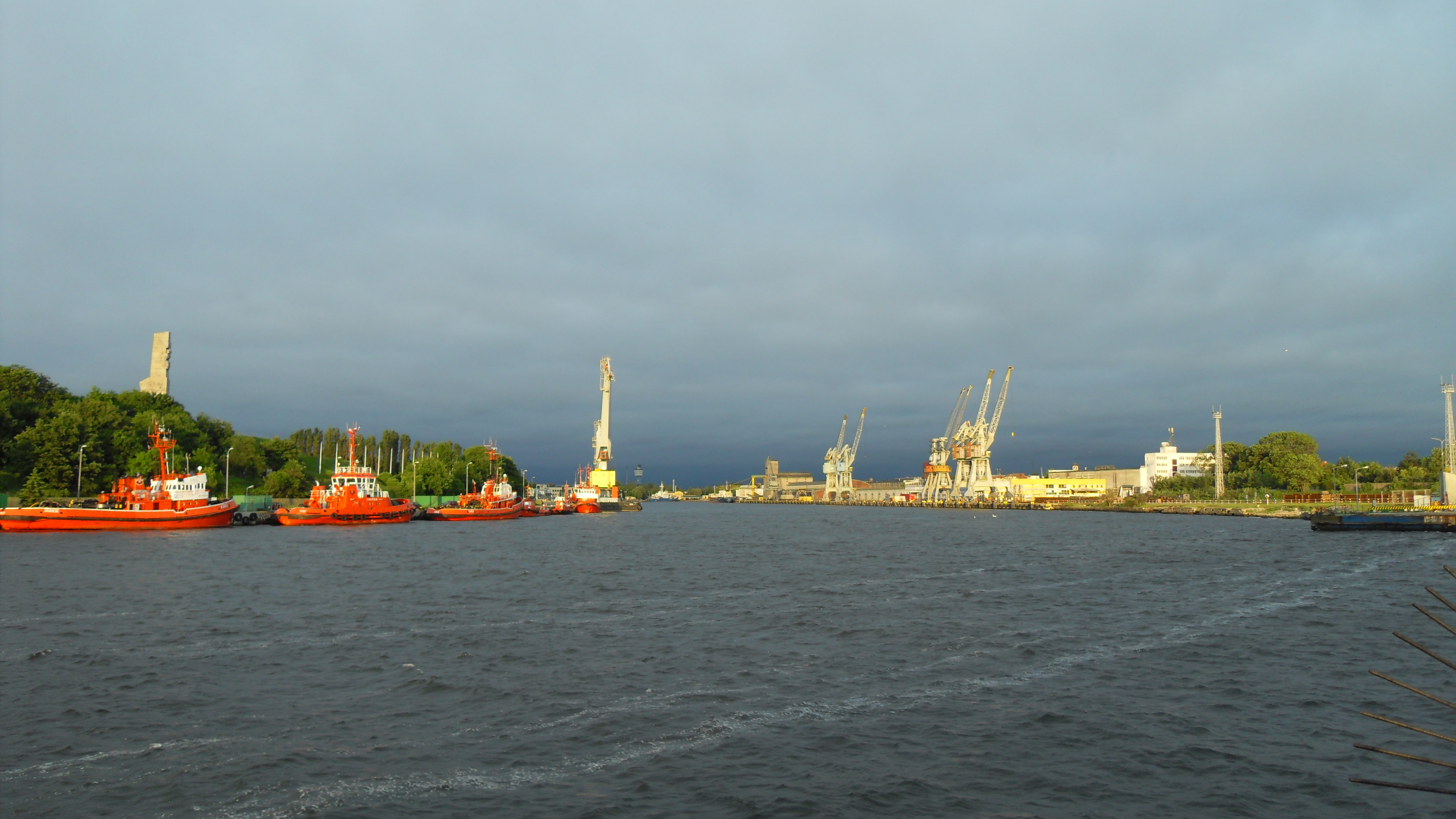 Gdańsk. Kanał Portowy, widok w stronę źródła. Po lewej Westerplatte, po prawej Nowy Port.